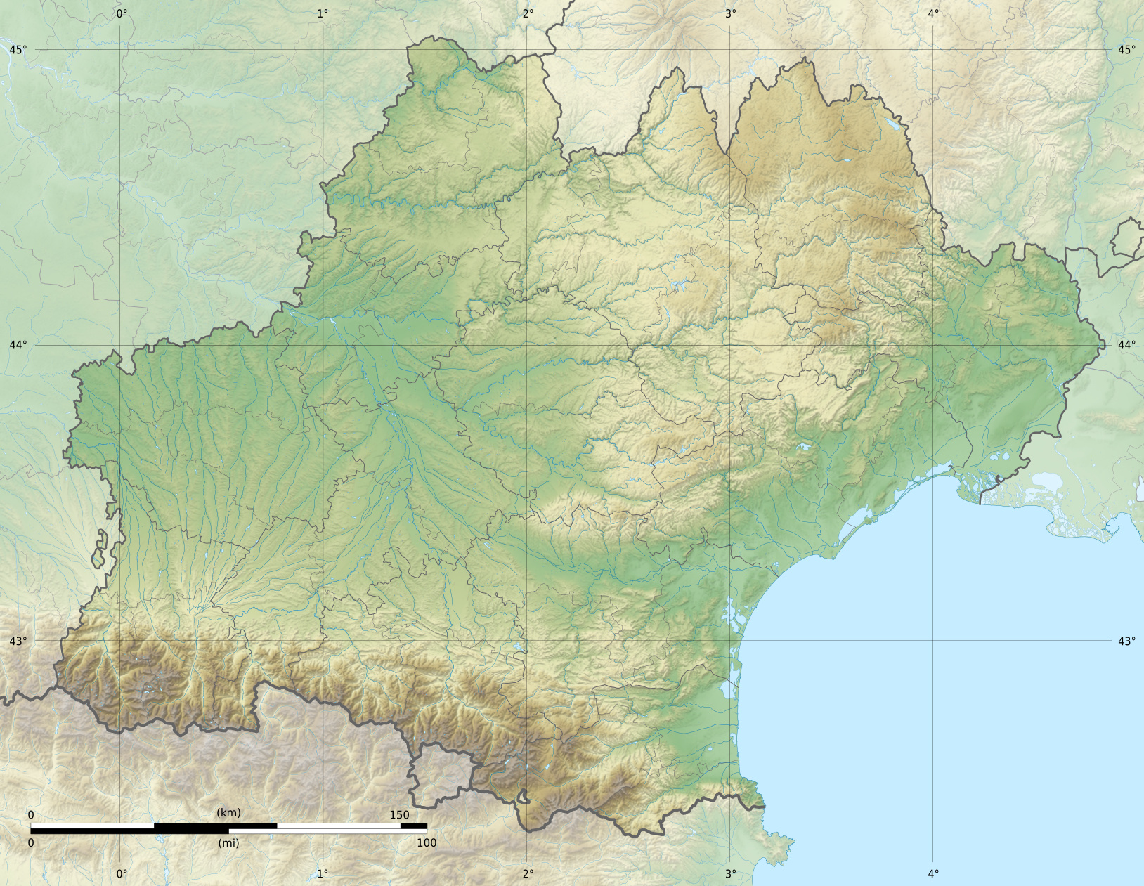 Carte topographique vierge de la région Languedoc-Roussillon-Midi-Pyrénées, France, destinée à la géolocalisation. Projection "Géoportail" (projection équirectangulaire à la latitude de référence 46.5° Nord) Limites géogrpahiques de la carte : West: -0.587 E East: 5.039 E North: 45.169 N South: 42.168 N